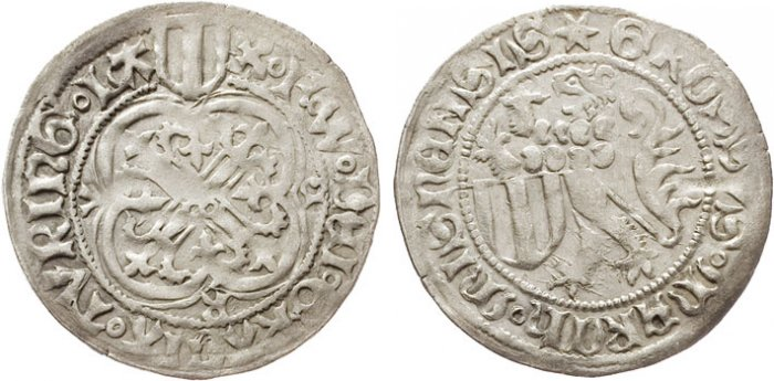 Schildgroschen o. J. 1442 bis 1444 (bis 1449?), Münzstätte Zwickau/Sangerhausen